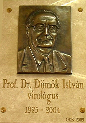 Prof. Dr. Dömök István emléktáblája az Országos Epidemiológiai Központ falán. Felavatták 2009. 09. 29.